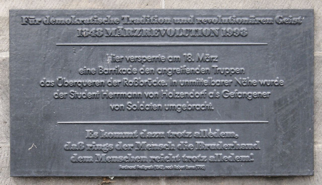 Gedenktafel für die Märzrevolution 1848. Roßstraßenbrücke, Berlin-Mitte. Enthüllt am 14. März 1998.